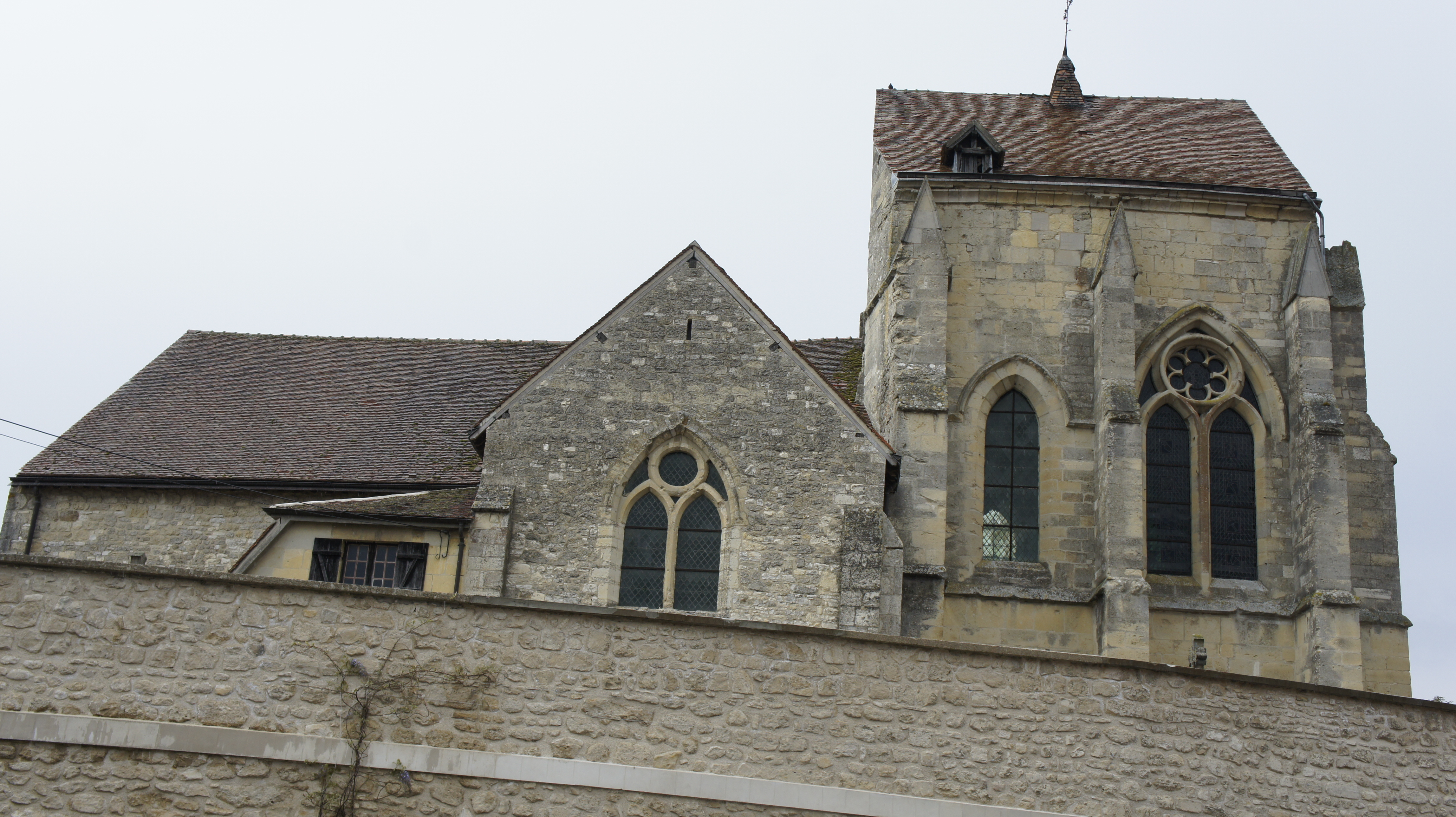 détails de l'Eglise Notre-Dame à Pévy .